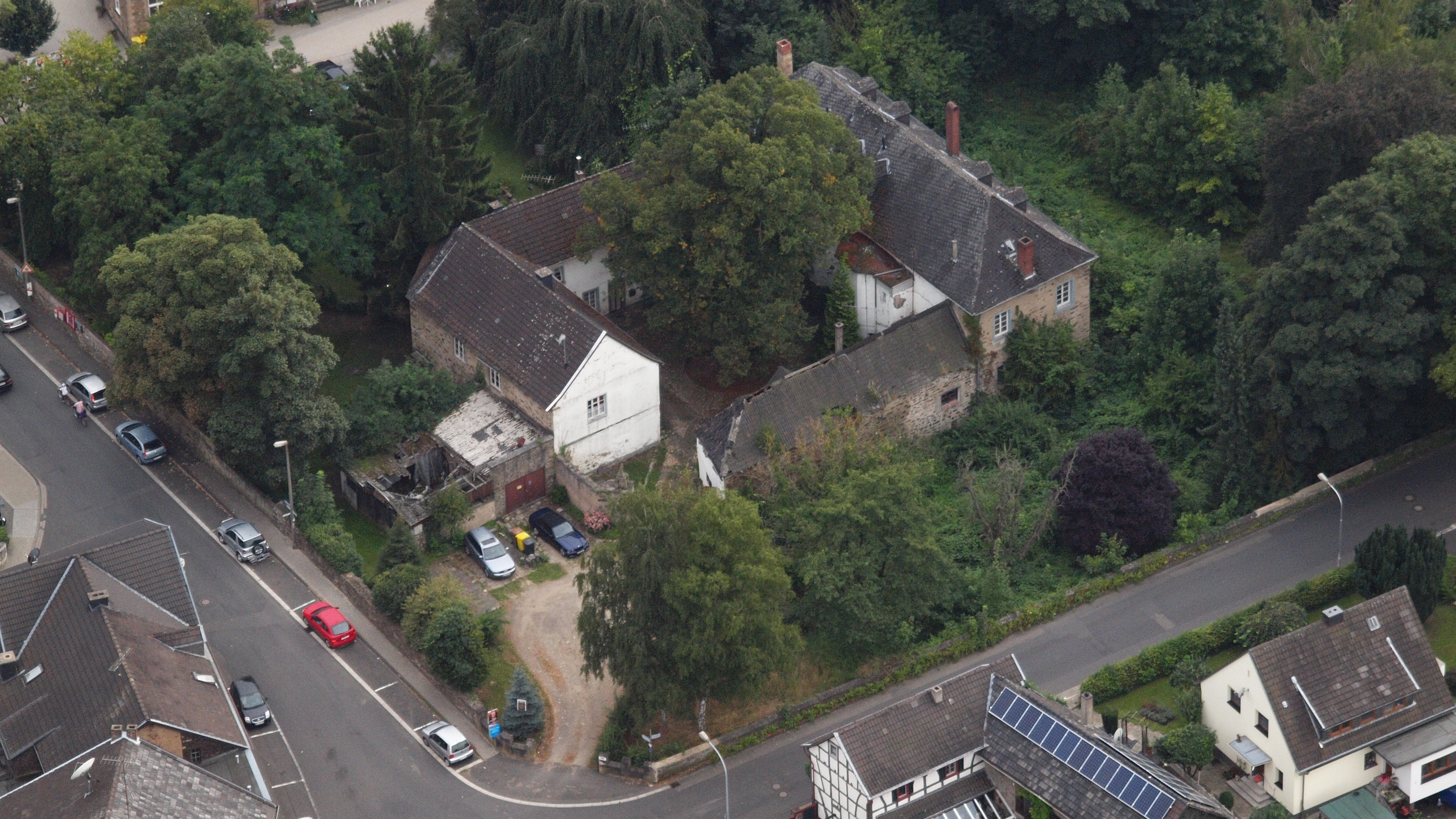 Burg Bodendorf in Bad Bodendorf: Luftaufnahme